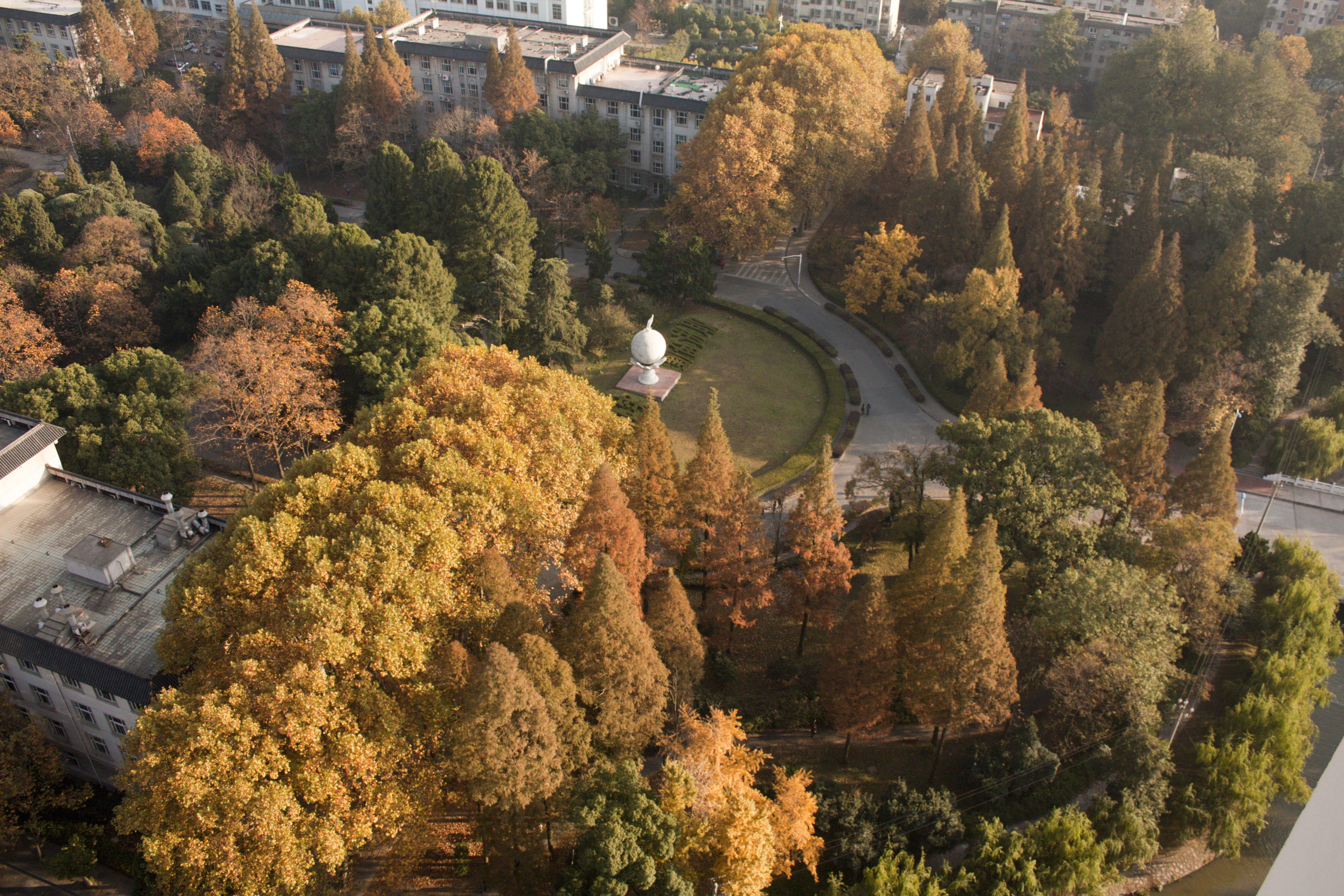 中文（中国大陆）: 南京林业大学秋天景象